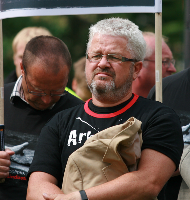 Rolf Terje Klungland